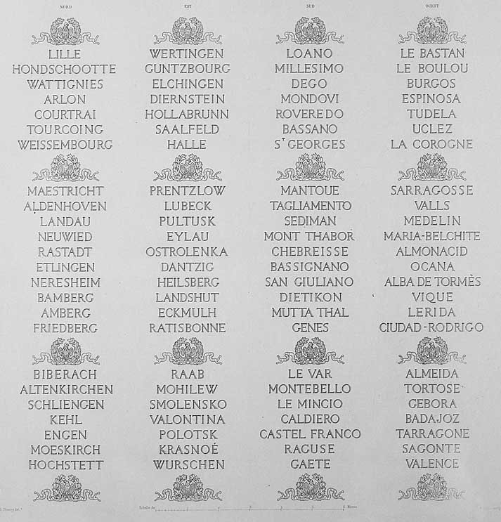 Namen der Schlachten, die auf den Innenseiten der großen Bögen des Arc de Triomphe eingraviert sind